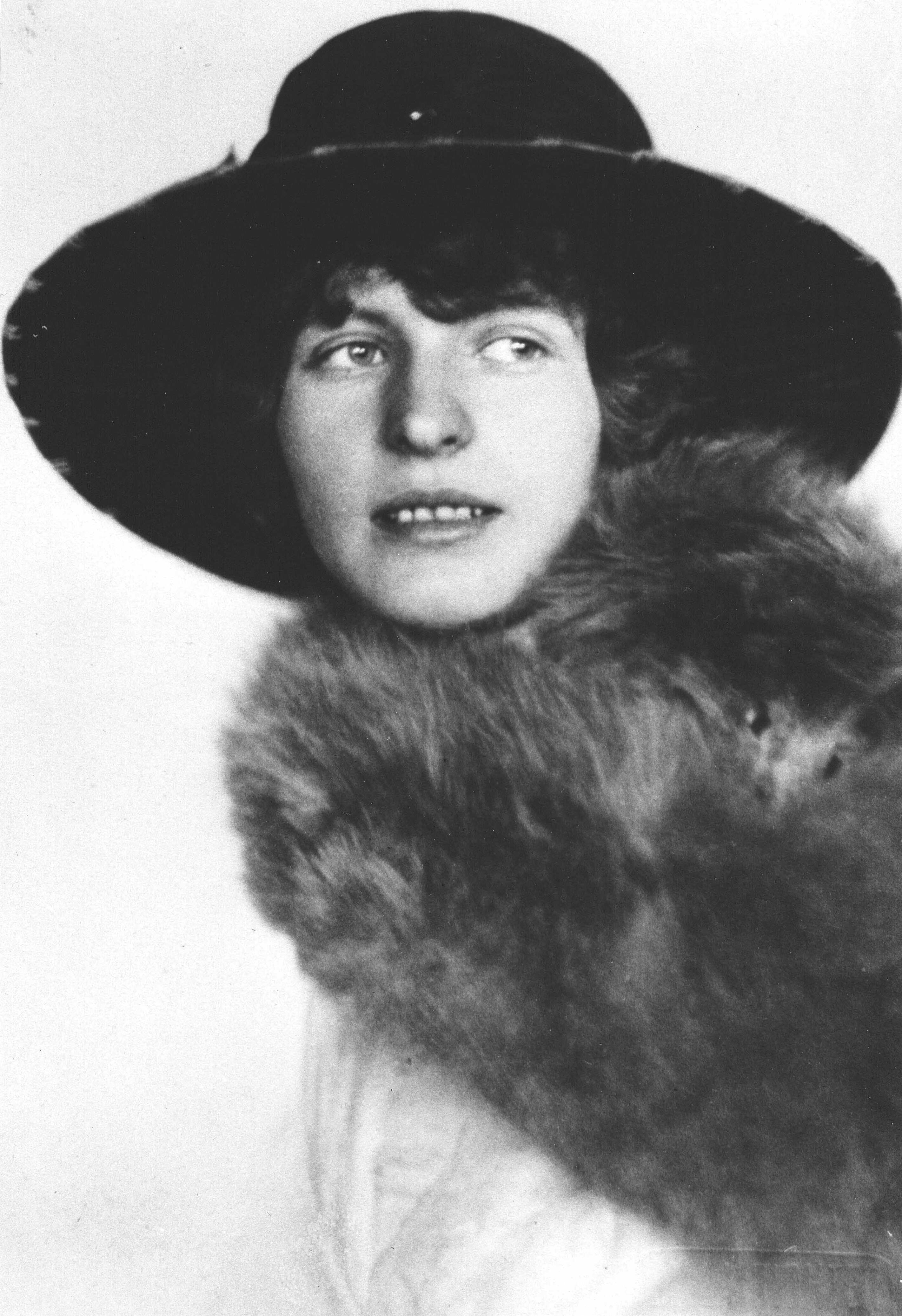 Marianne Golz. Überlassen von am 14.8.2009